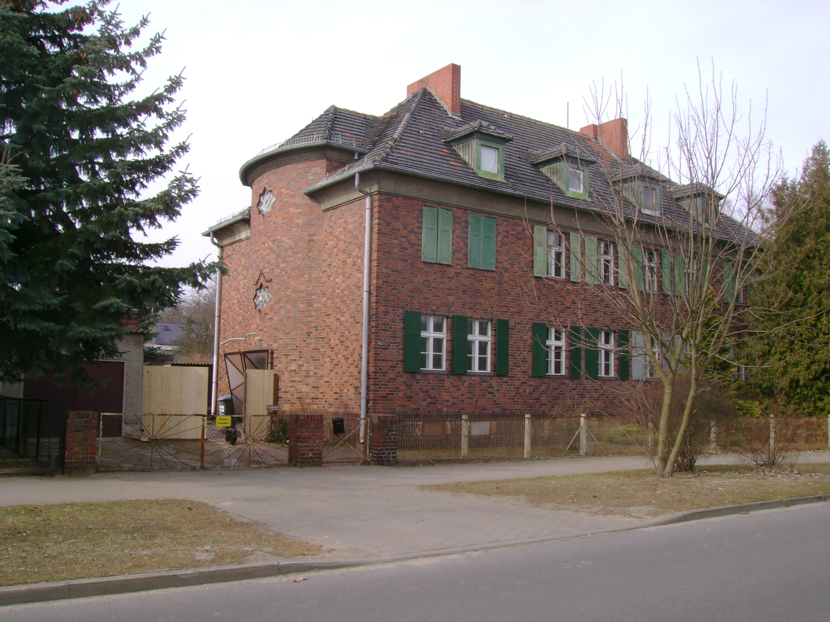 Denkmalgeschütztes Wohnhaus in Velten Bötzower Straße 192.